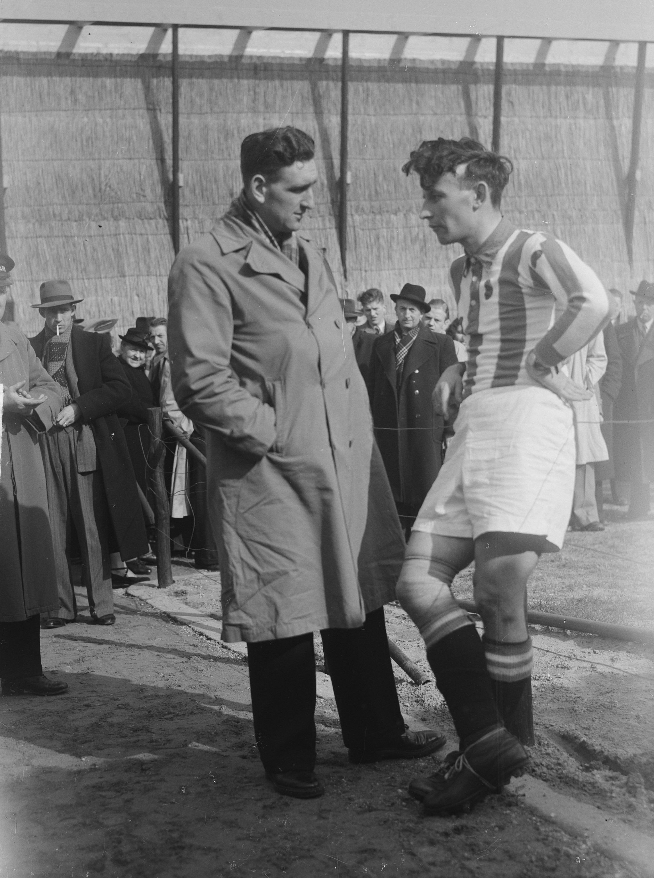 Collectie / Archief : Fotocollectie Anefo Reportage / Serie : [ onbekend ] Beschrijving : Landskampioenschap. VSV-Heerenveen 1-4. Abe Lenstra spreekt met Piet Kraak (als toeschouwer aanwezig) Datum : 27 maart 1949 Locatie : Noord-Holland, Velsen Trefwoorden : sport, voetbal Persoonsnaam : Kraak, Piet, Lenstra, Abe Fotograaf : Fotograaf Onbekend / Anefo Auteursrechthebbende : Nationaal Archief Materiaalsoort : Glasnegatief Nummer archiefinventaris : bekijk toegang 2.24.01.09 Bestanddeelnummer : 903-2858